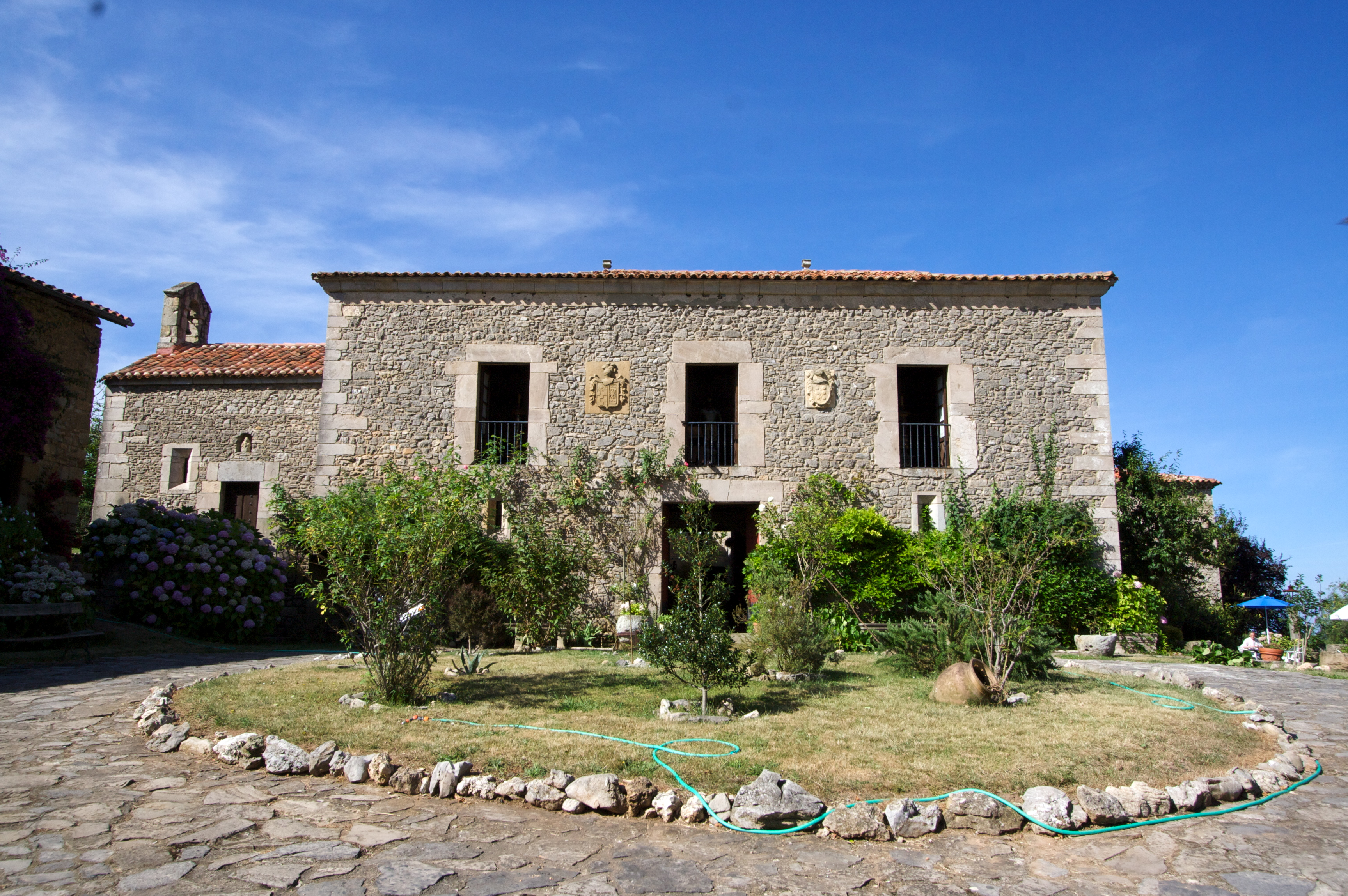 Palacio de Gobiendes, Colunga